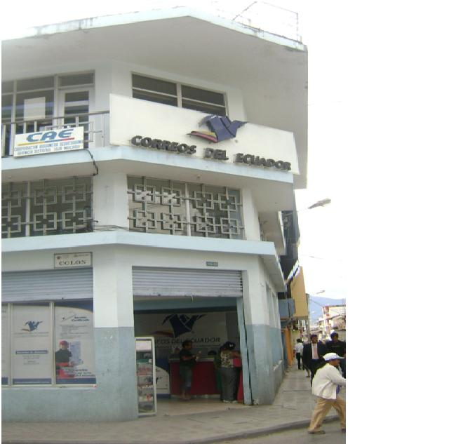 Esta fotografia es de las Intalaciones de Correos del Ecuador de la ciudad de Loja